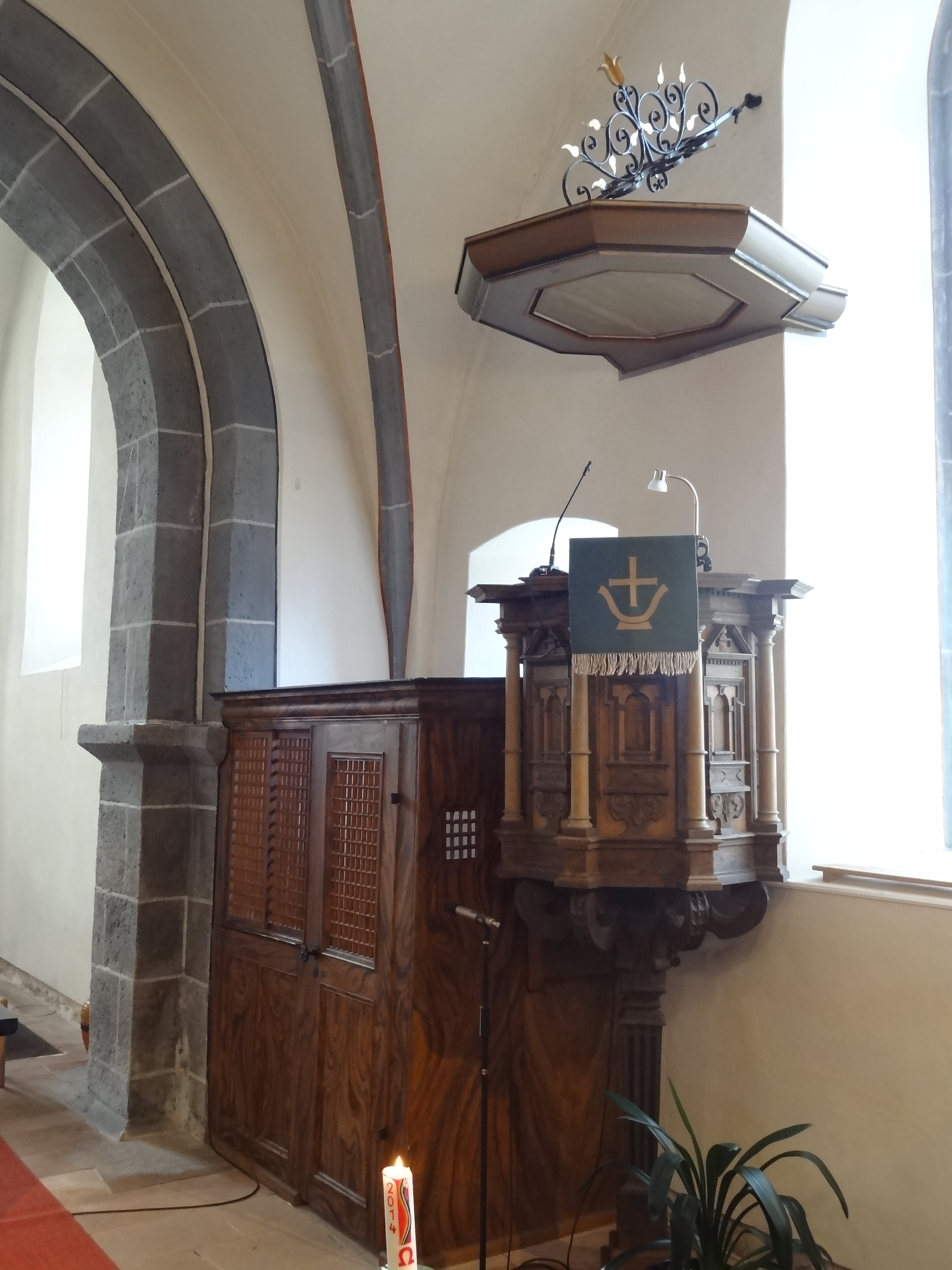 Evangelische Kirche Muschenheim